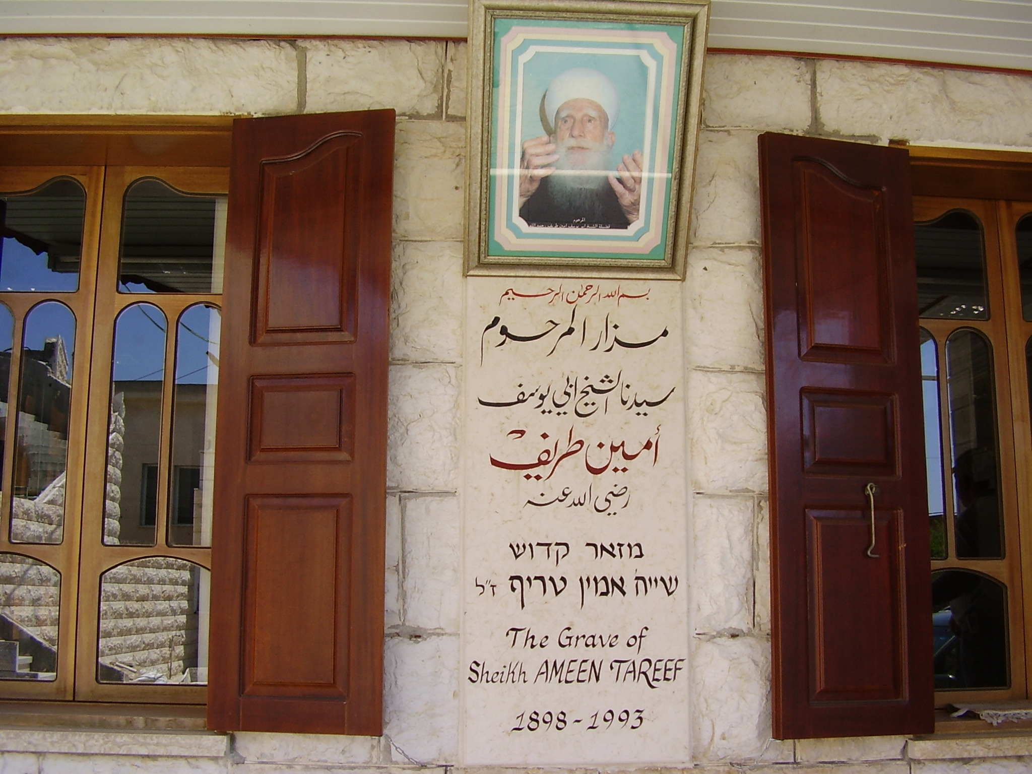 בית אמין טריף בג'וליס